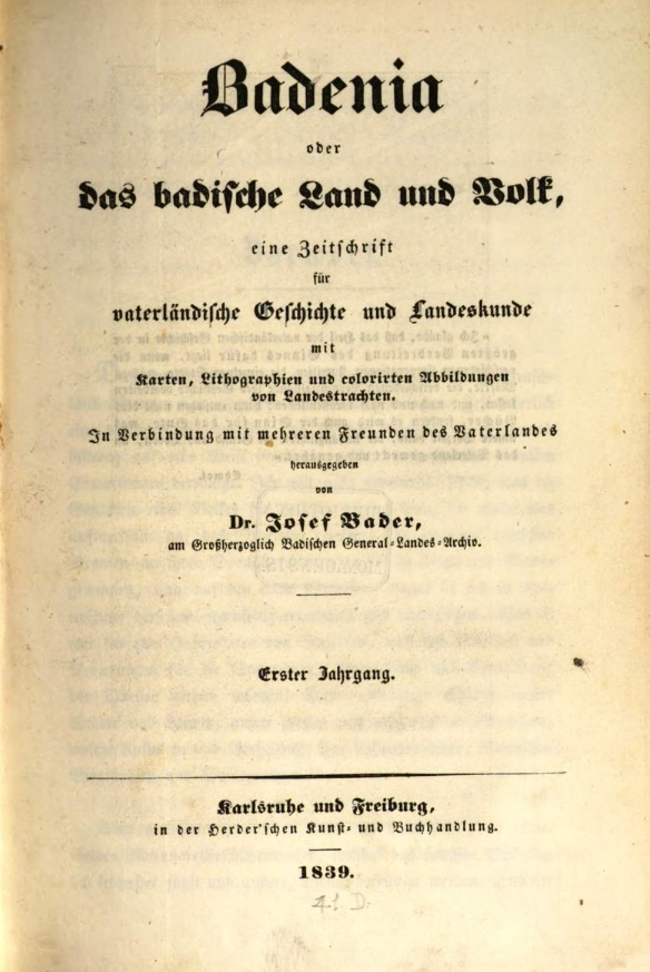 Titelseite des ersten Bandes (1839)